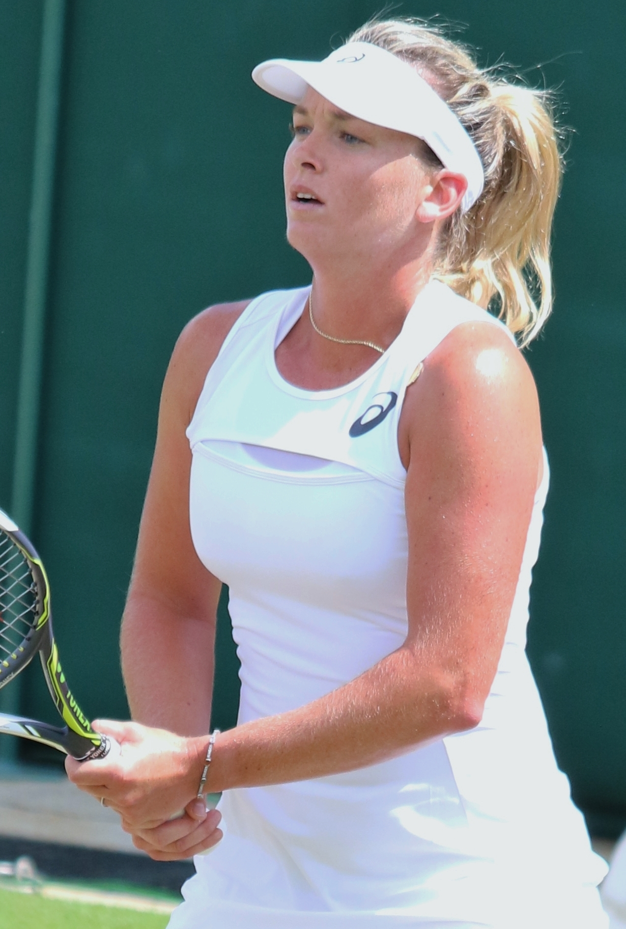 Vandeweghe WM17 (19)